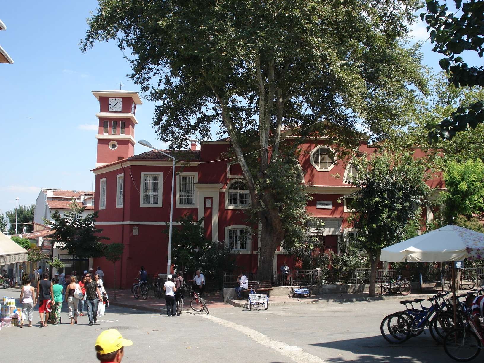 Η εκκλησία του Αγίου Νικολάου στη Χάλκη (Πριγκηπόνησα). Άδεια χρήσης Το παραπάνω αρχείο διανέμεται υπό τις δύο παρακάτω άδειες χρήσης. Μπορείτε να επιλέξετε την άδεια της προτίμησής σας.